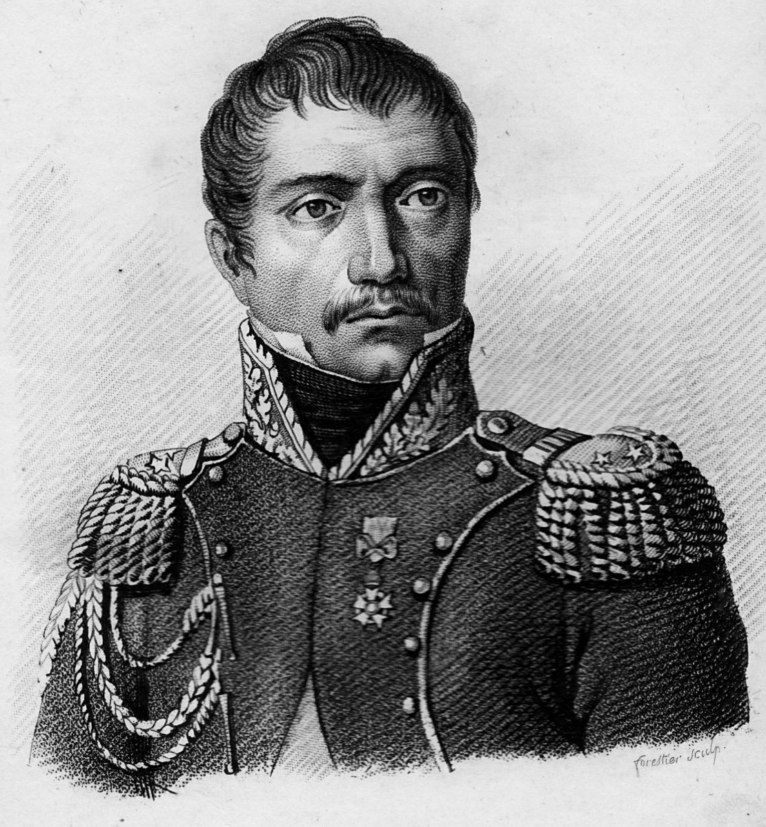 Eugène Antoine François Merlin, général d'Empire et colonel du 4e régiment de gardes d'honneur en 1814. Pendant les Cent-Jours, il organise le régiment des chasseurs à cheval de la Jeune Garde, et combat à Waterloo.